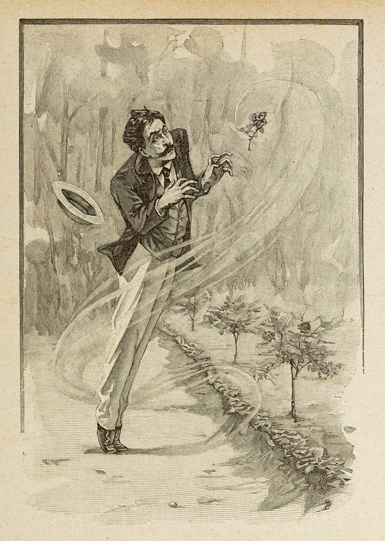 Illustration de la nouvelle de Maupassant Le Horla, édition Librairie Ollendorff, 1908. Gravure sur bois de Georges Lemoine d'après un dessin de William Julian-Damazy (1865-1910).